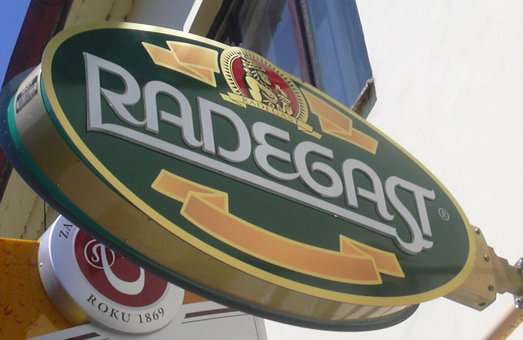 Radegast logo(Beer- czech republic)